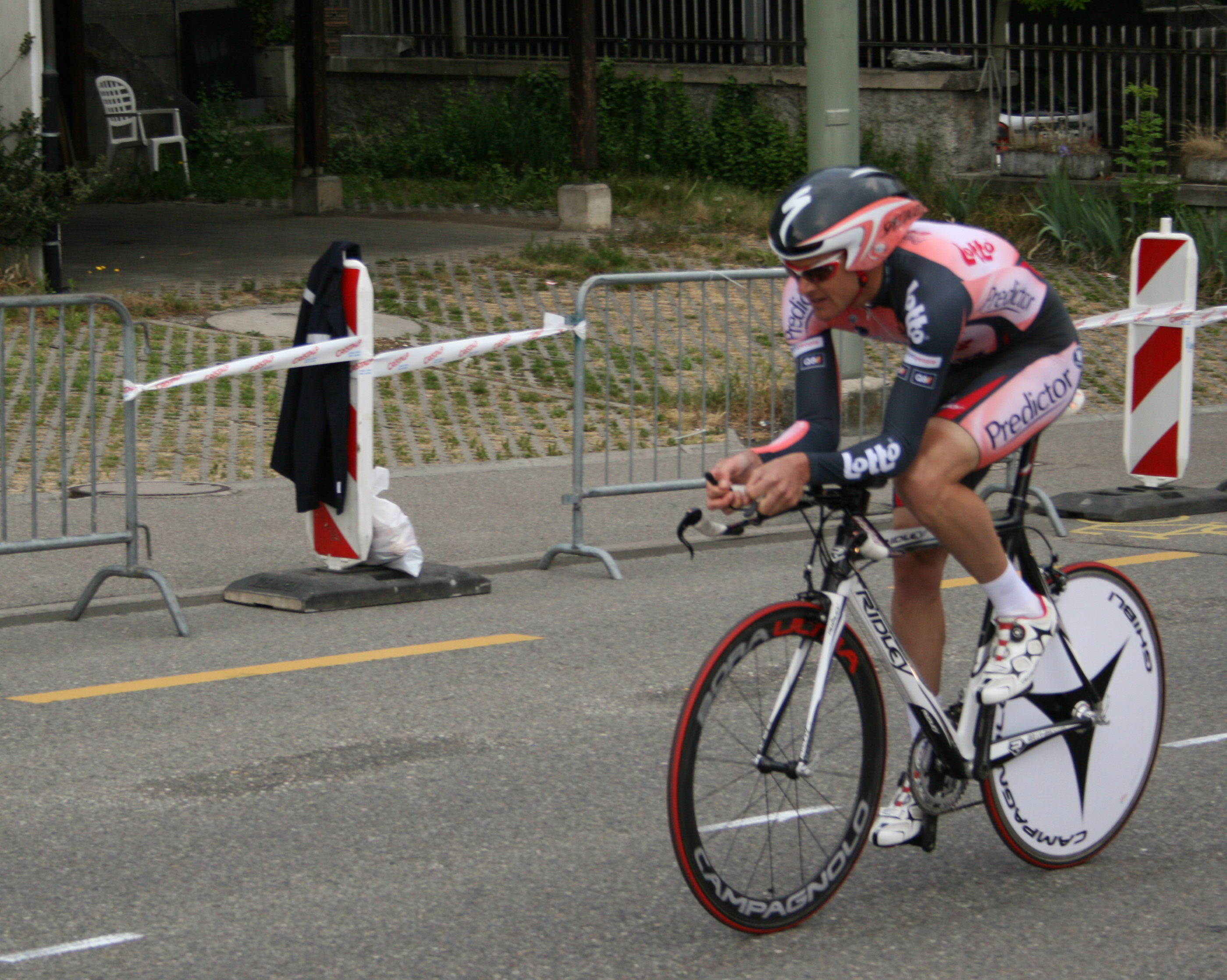 Nick Gates prologue du Tour de Romandie 2007